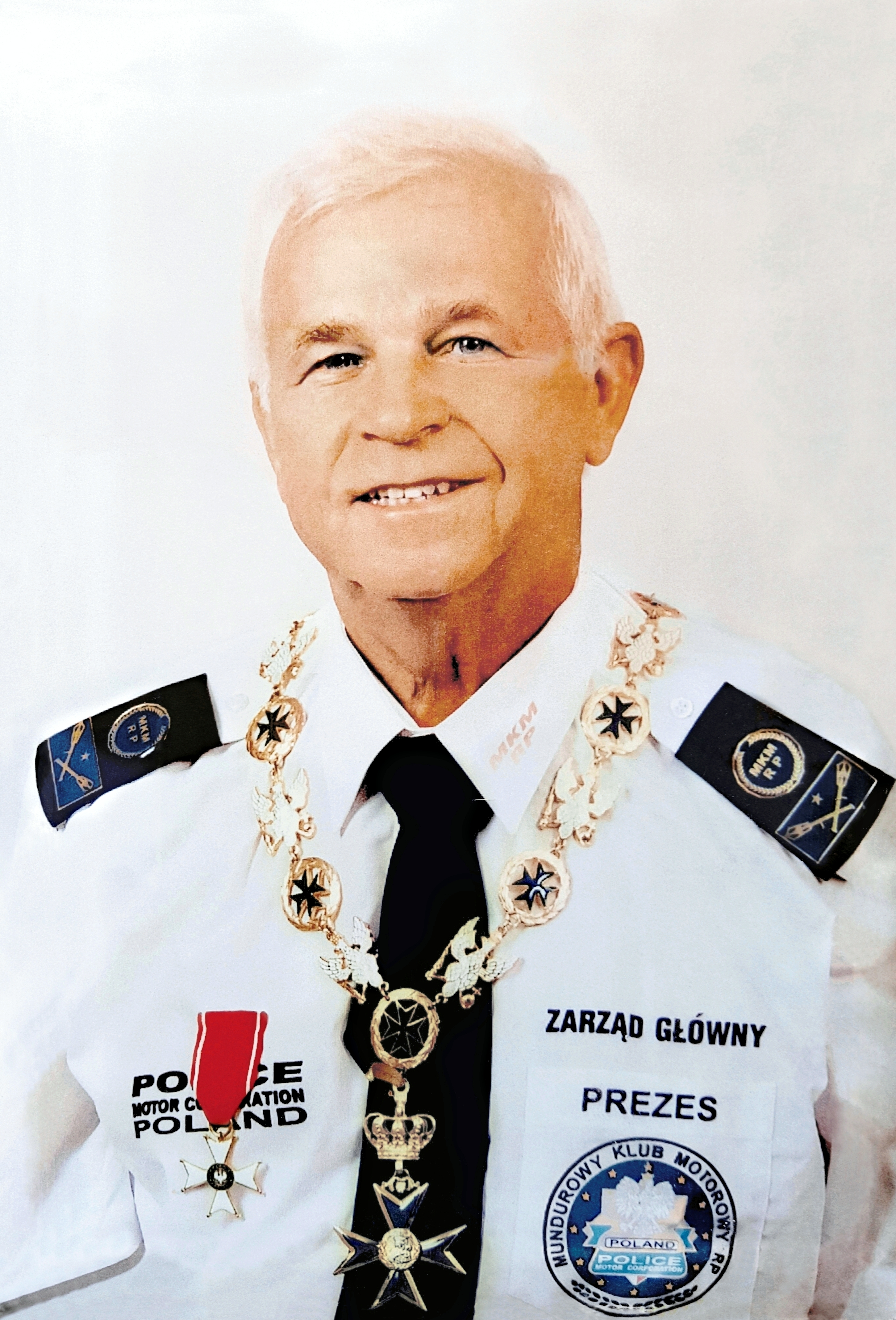 Dieter Josef Przewdzing, deutsch-polnischer Bürgermeister Deschowitzes, Mordopfer